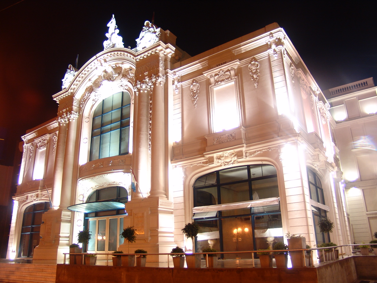 Teatro Municipal 1º de Mayo. Santa Fe, Argentina. Teatro Municipal en Santa Fe (Argentina)